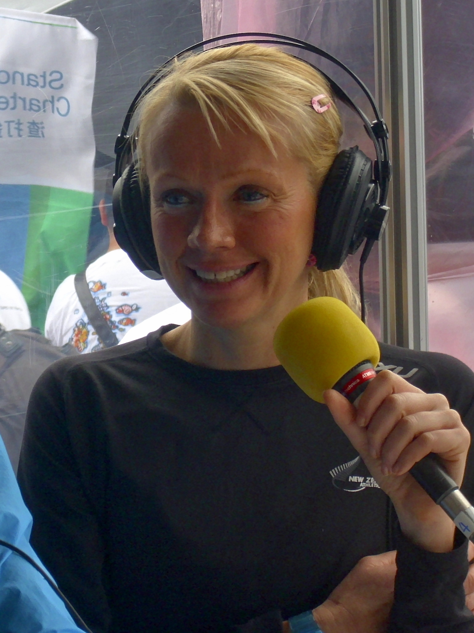 2010 Taipei 101 Run Up: Melissa Moon.